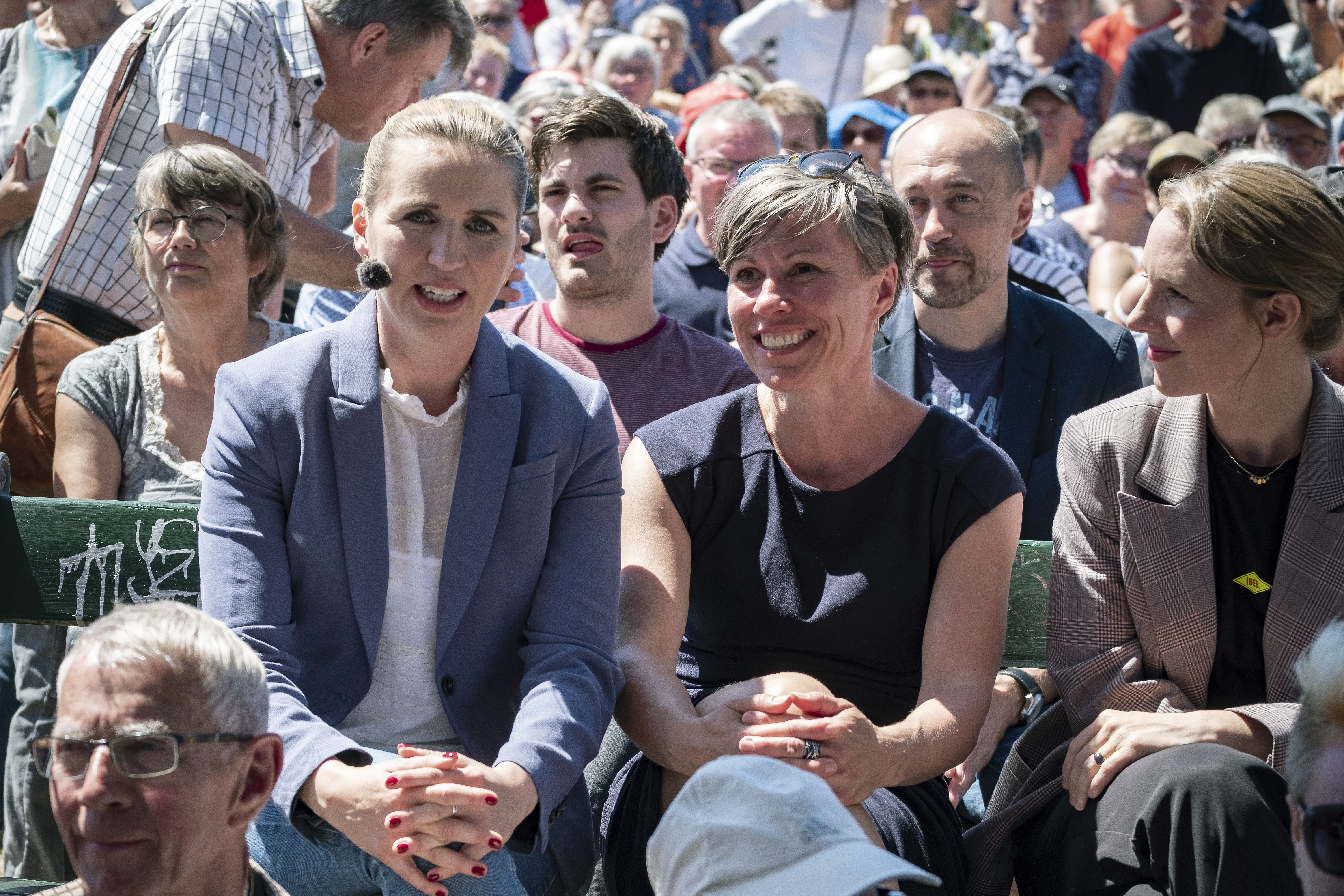 20190614. Folkemødet i Allinge på Bornholm. Socialdemokratiets ledare och troligen Danmarks kommande statsminister Mette Frederiksen till vänster med Bornholms borgmästare Winni Grosbøll (S) till höger minuterna innan Mette Frederiksen går upp på huvudscenen på Cirkuspladsen för att hålla sitt partiledartal. Photo: News Øresund - Johan Wessman © News Øresund - Johan Wessman (CC BY 3.0). Detta verk av News Øresund är licensierat under en Creative Commons Erkännande 3.0 Unported-licens (CC BY 3.0). Bilden får fritt publiceras under förutsättning att källa anges. .The picture can be used freely under the prerequisite that the source is given. News Øresund, Malmö, Sweden News Øresund är en oberoende regional nyhetsbyrå som är en del av det oberoende dansk-svenska kunskapscentrat Øresundsinstituttet.. .